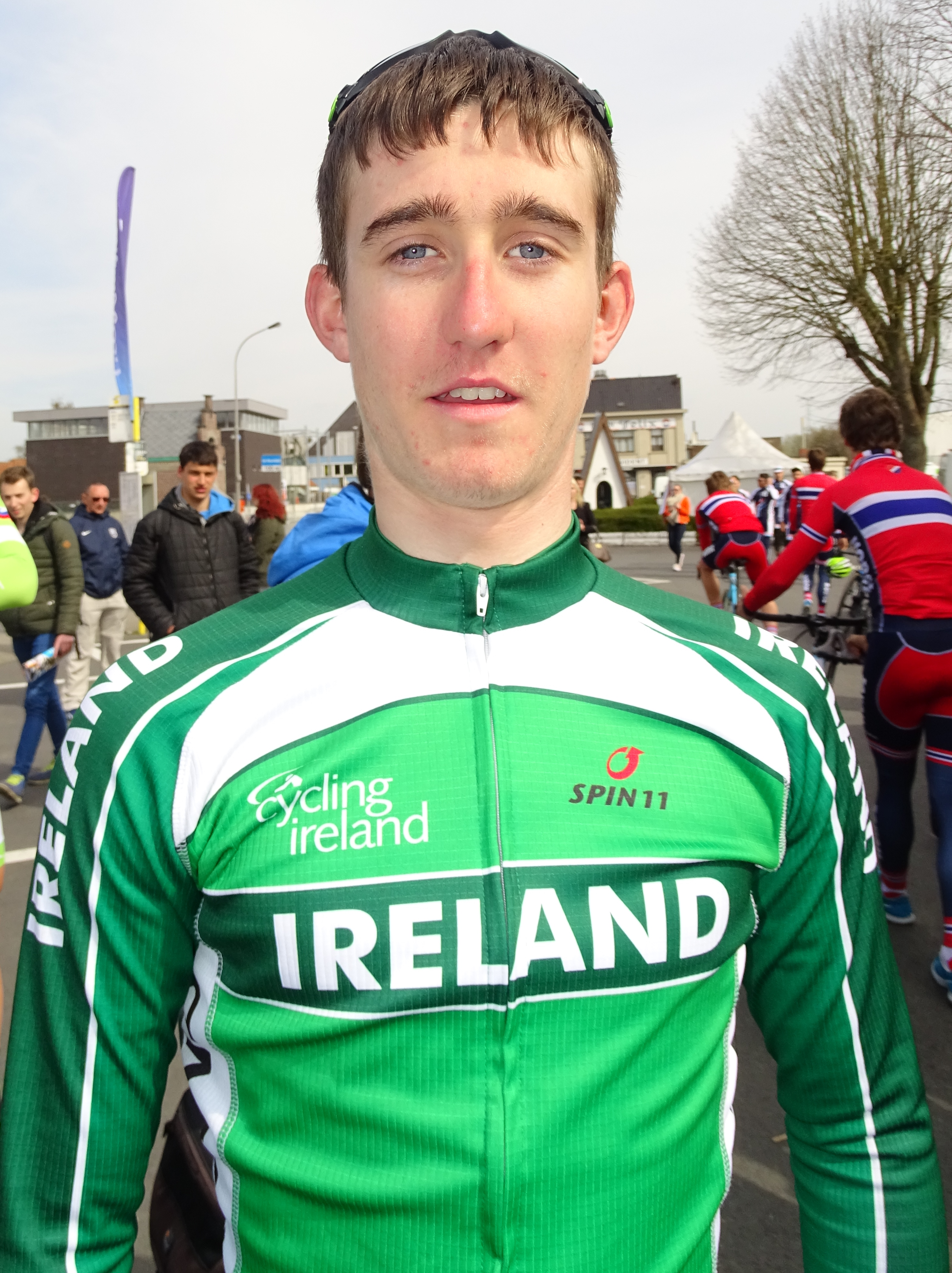 Reportage réalisé le samedi 9 avril à l'occasion du départ et de l'arrivée du Tour des Flandres espoirs 2016 à Audenarde, Belgique.